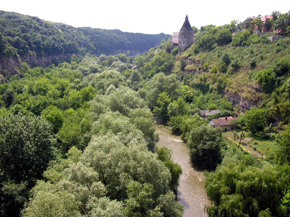 Kaňon řeky Smatryč v Kam'janci Podilském